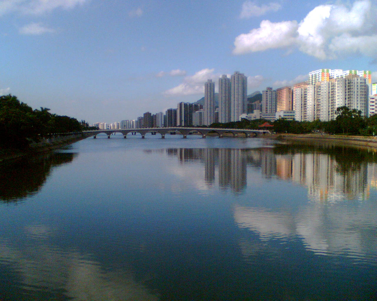 從獅子山公路前望城門河